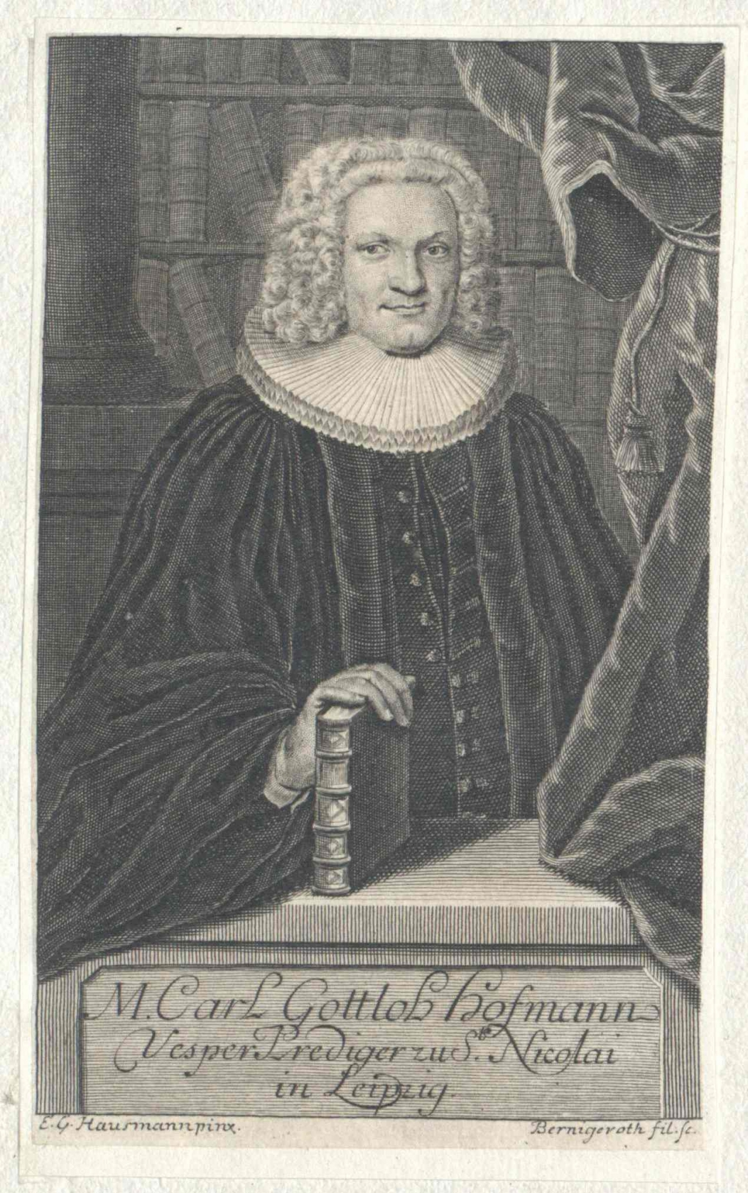 Carl Gottlob Hofmann (1703–1774), Stich von J.M.Bernigeroth nach E.G.Hausmann